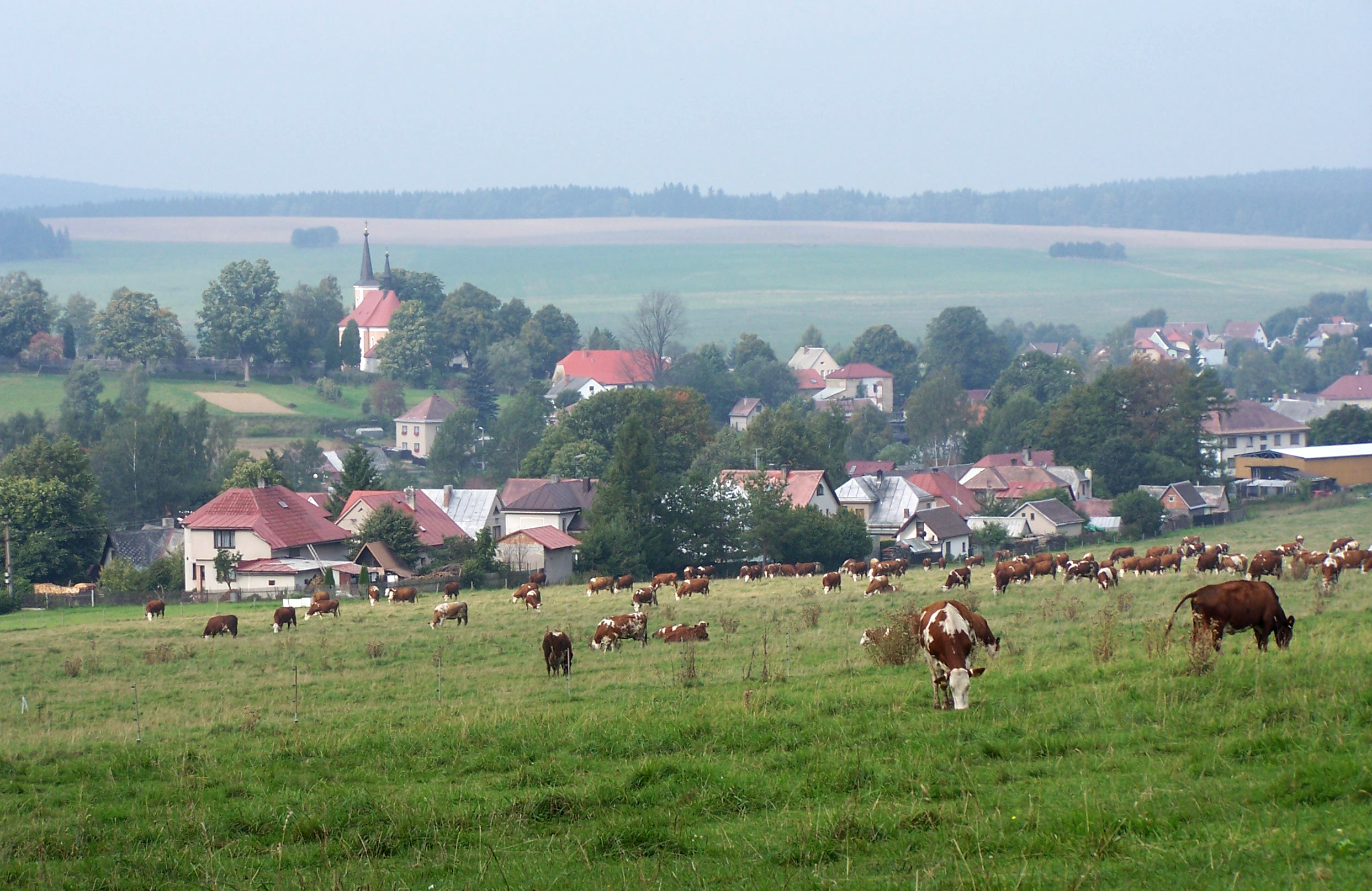 Pohled na Herálec (okres Žďár nad Sázavou) (to vypadá na část Moravský Herálec někde od východu od Kopanin).